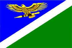 Флаг Дахадаевского района Дагестана